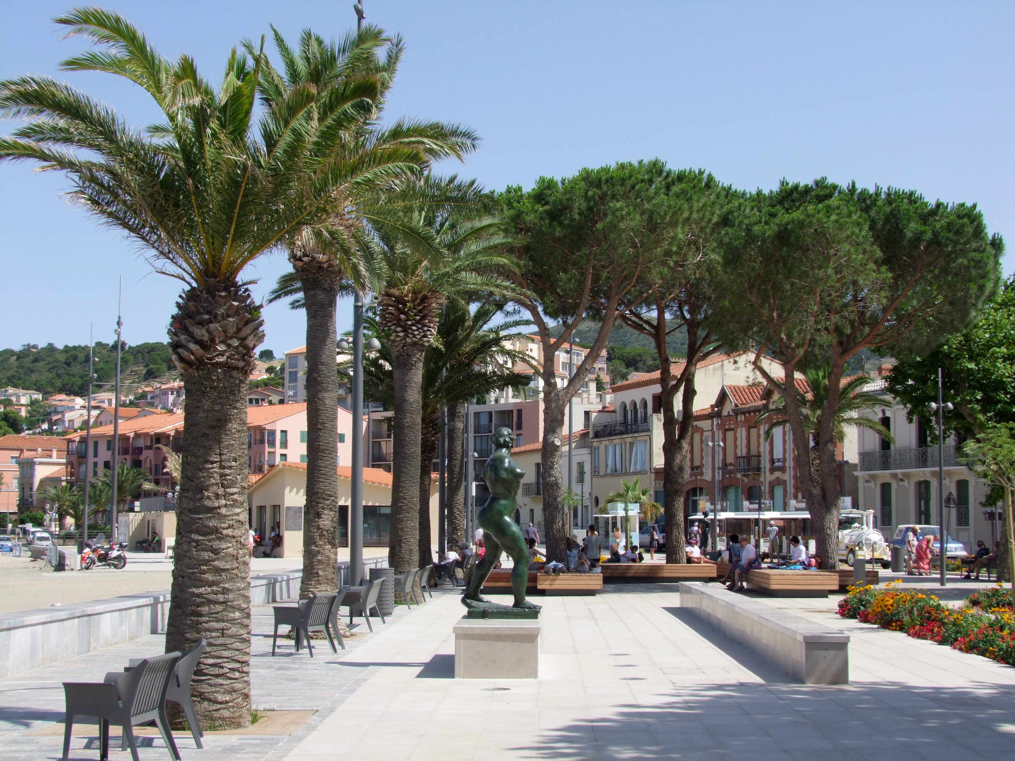 Le nouveau front de mer à Banyuls rehausse son art d'y vivre paisiblement au bord de la Méditerranée, tout autant en villégiature culturelle.